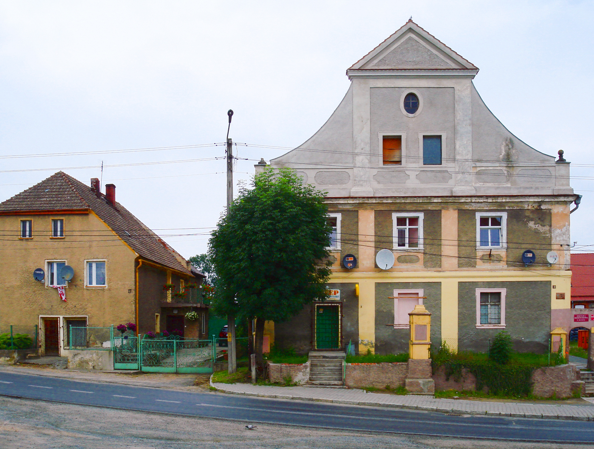 Rechts das ehemalige katholische Pfarrhaus in Byczeń (Baitzen), Polen. Links ein Wohnhaus. Lage genau nördlich vis-à-vis der Kirche. Das Pfarrhaus wurde noch vor der jetzigen Kirche erbaut, weil es Probleme gab, die vakante Pfarrstelle zu besetzen und das vorherige Pfarrhaus sich in einem wenig einladenden Zustand befunden haben muss.